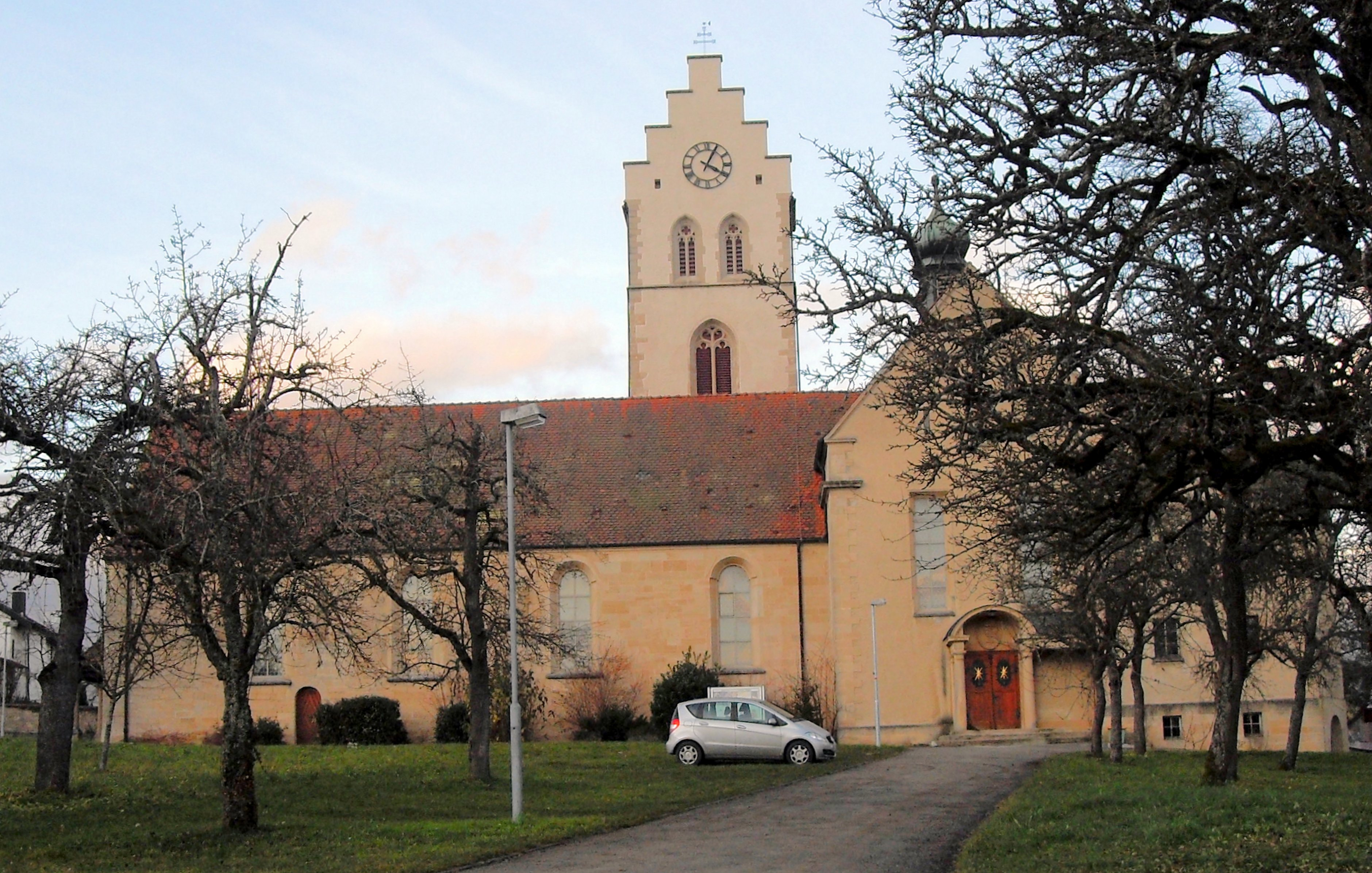 Pfarrkirche St. Laurentius in Tengen, Deutschland